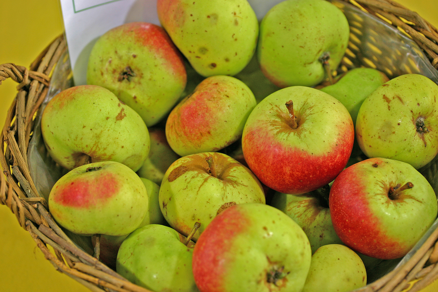 Der Zwiebelborsdorfer ist eine alte Sorte des Kulturapfels. Synonyme sind Oignon de Borsdorf, Zipollenapfel und Zwiebelapfel.